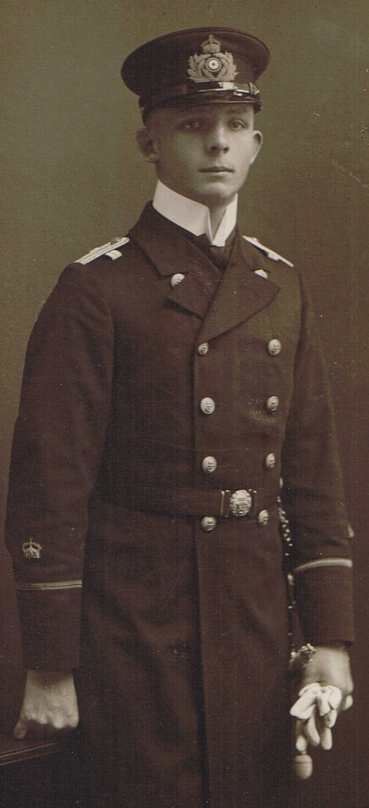 Martin Gebhardt als Leutnant zur See, jüngerer Bruder von Konteradmiral Heinrich Gebhardt